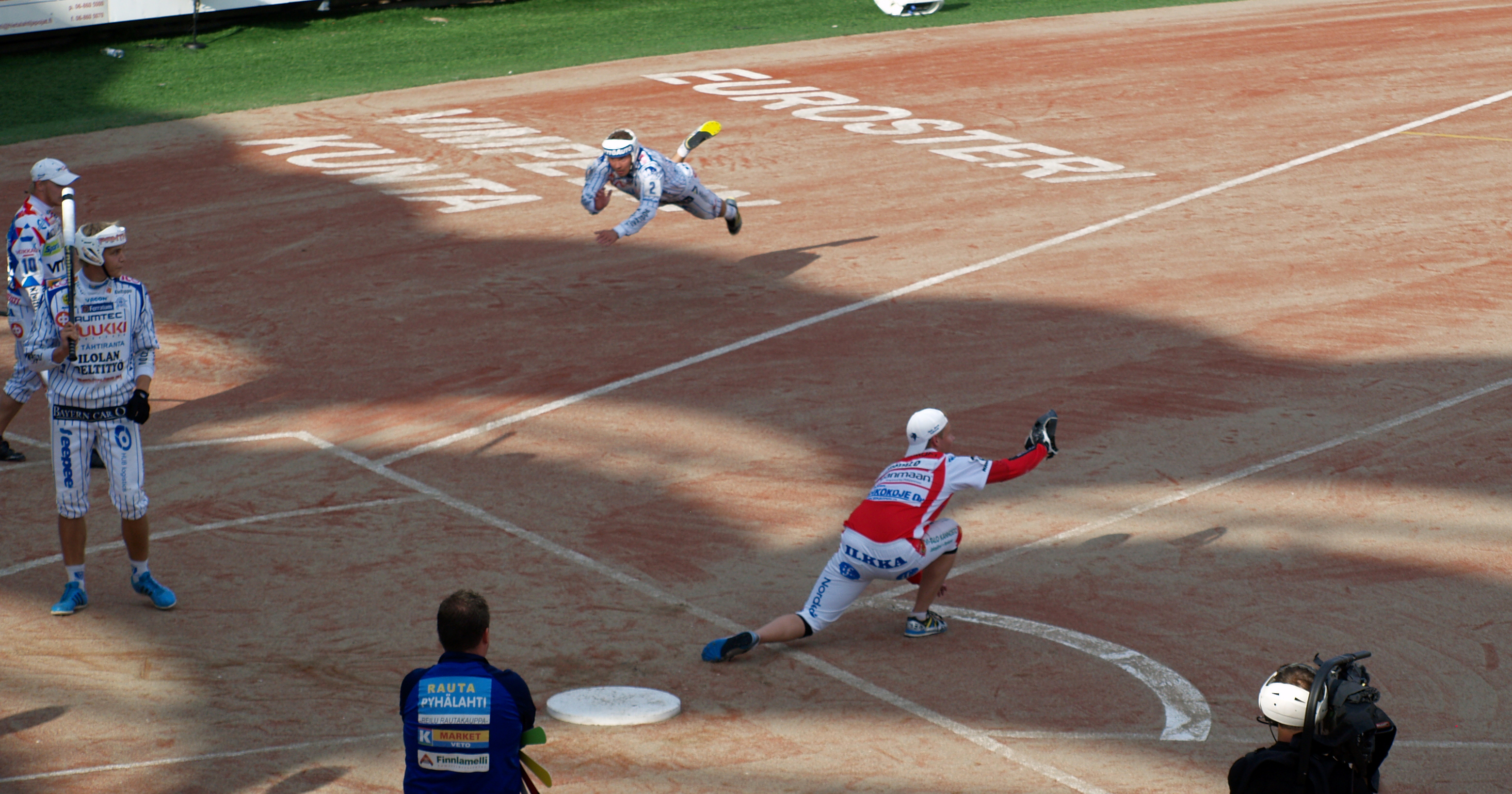 Vimpelin Veto - Koskenkorvan Urheilijat pesäpallo-ottelu 1.8.2014. Kuvassa syöksyy Sami Haapakoski.